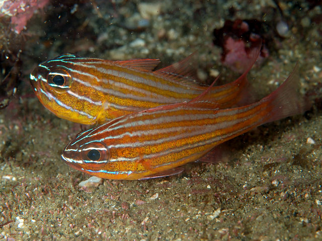 キンセンイシモチ Apogon properuptus